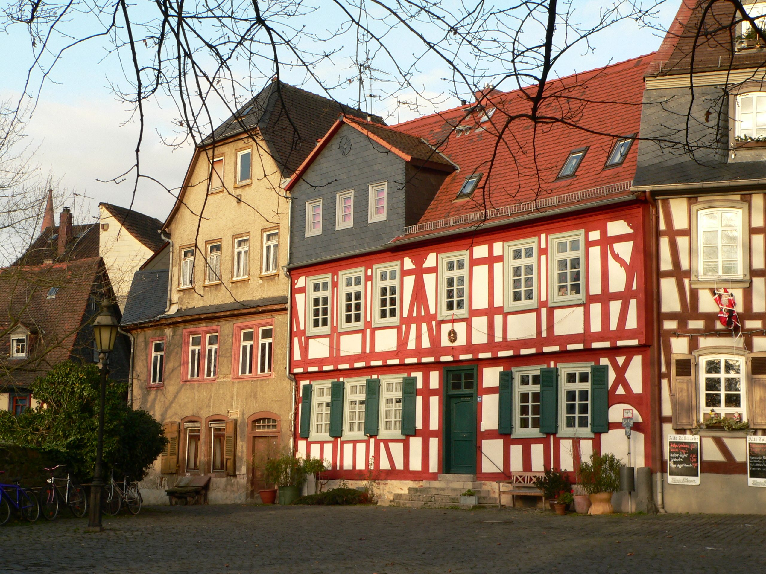 Konstrast - renoviertes und nicht renoviertes Fachwerkhaus am Höchster Schloßplatz